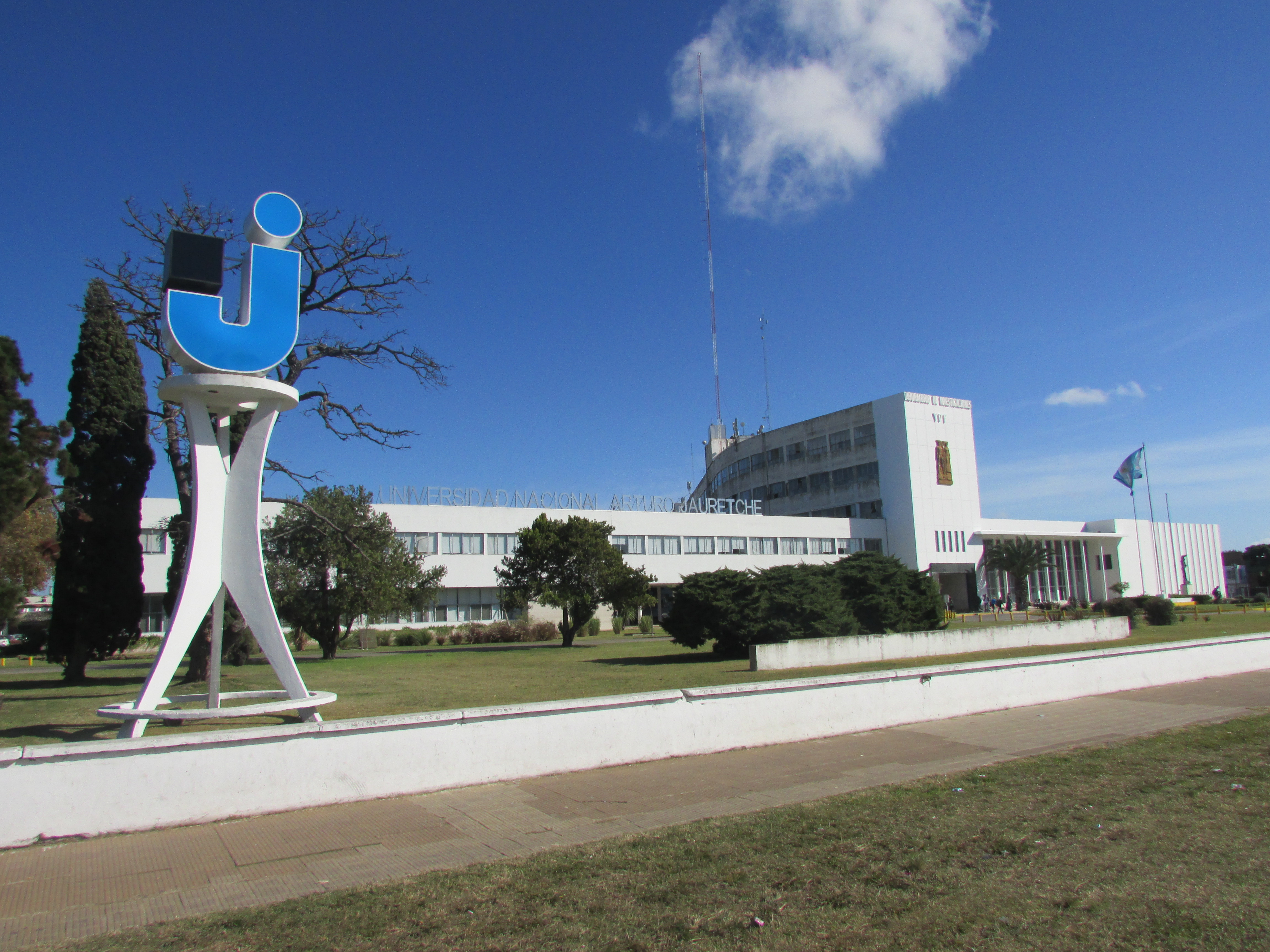 Fachada principal de la Universidad Nacional Arturo Jauretche sobre la Avenida Calchaquí